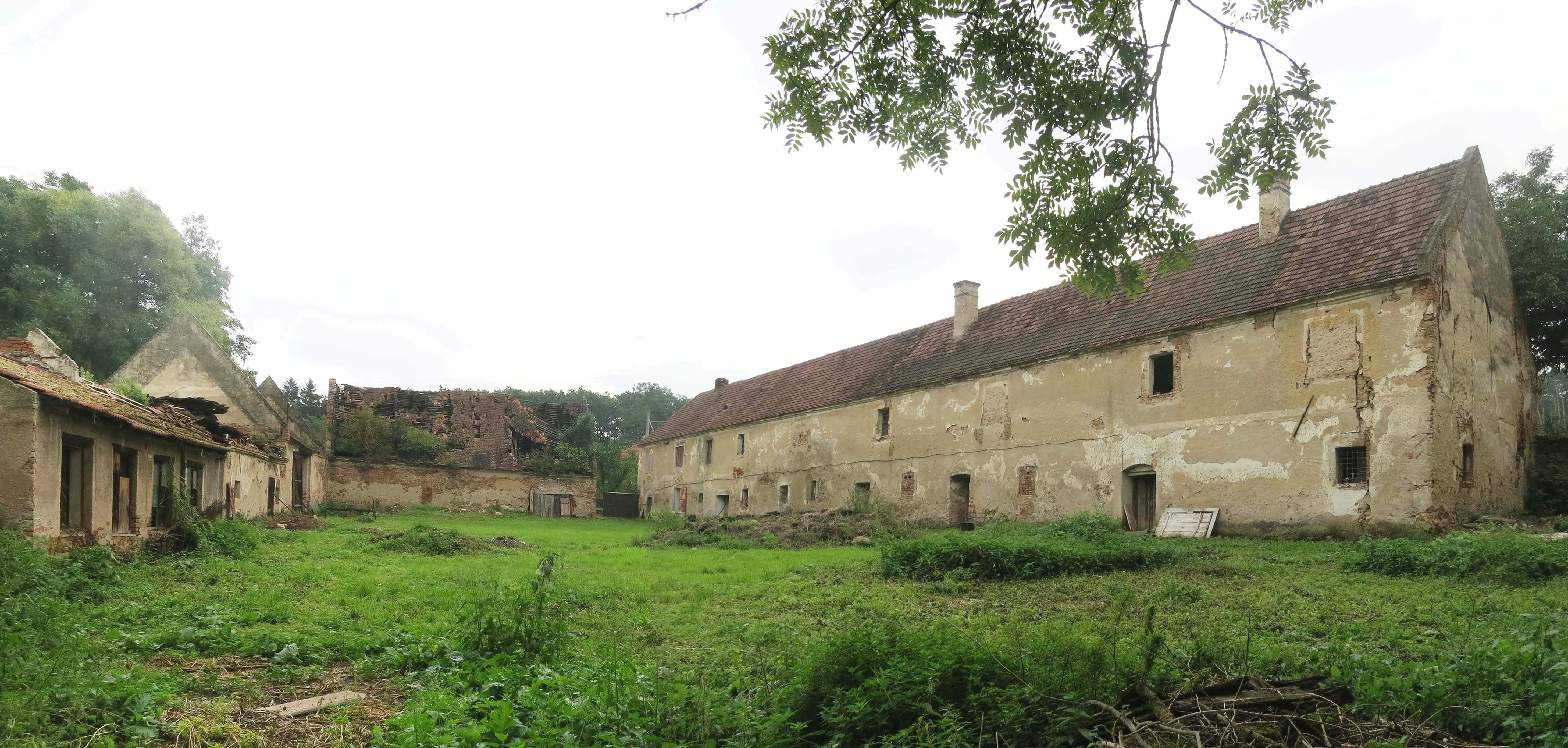 Budovy bývalé renesanční sladovny a stájí ve dvoře Alinkově